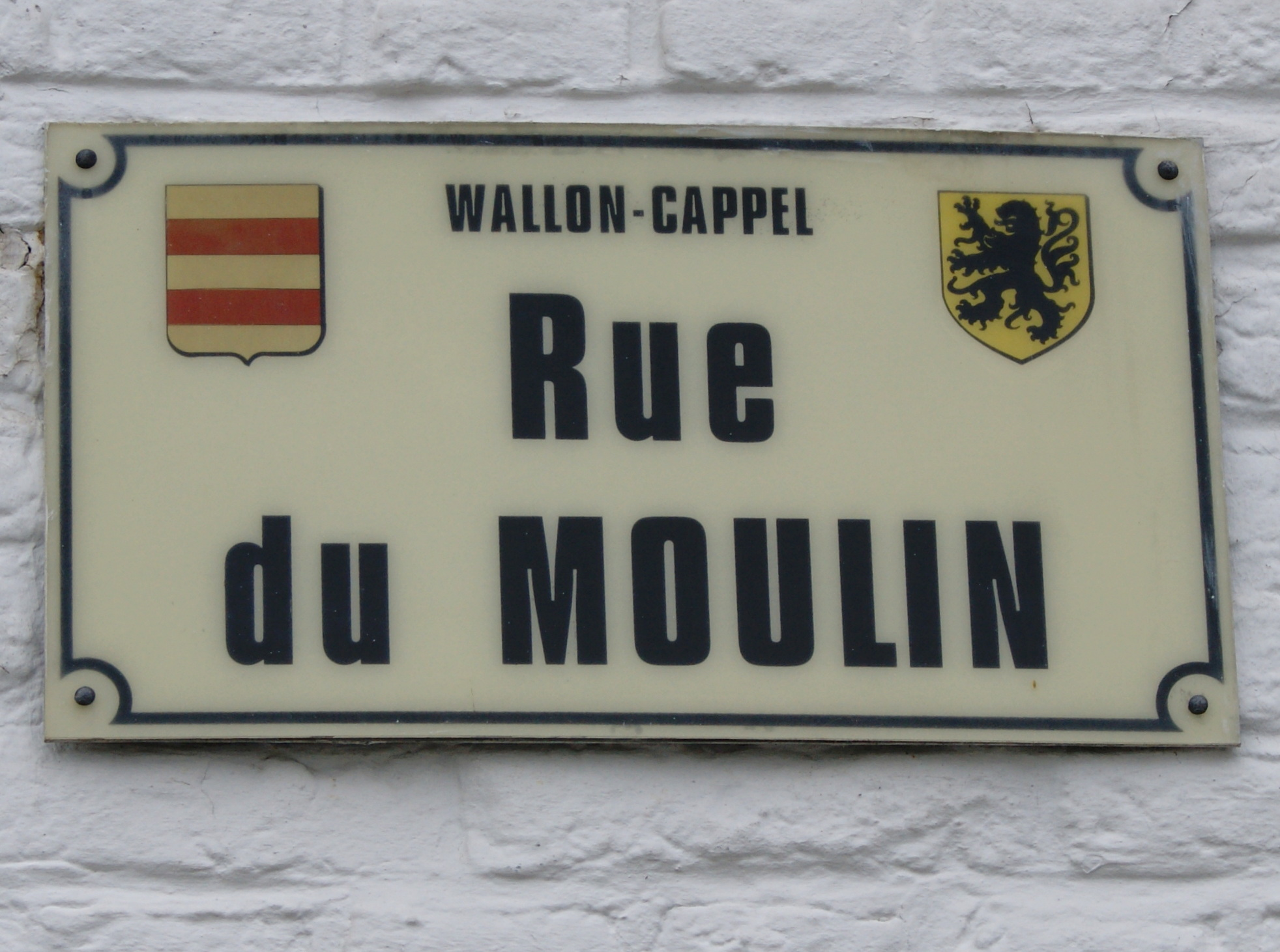 Rue du Moulin à Wallon-Cappel